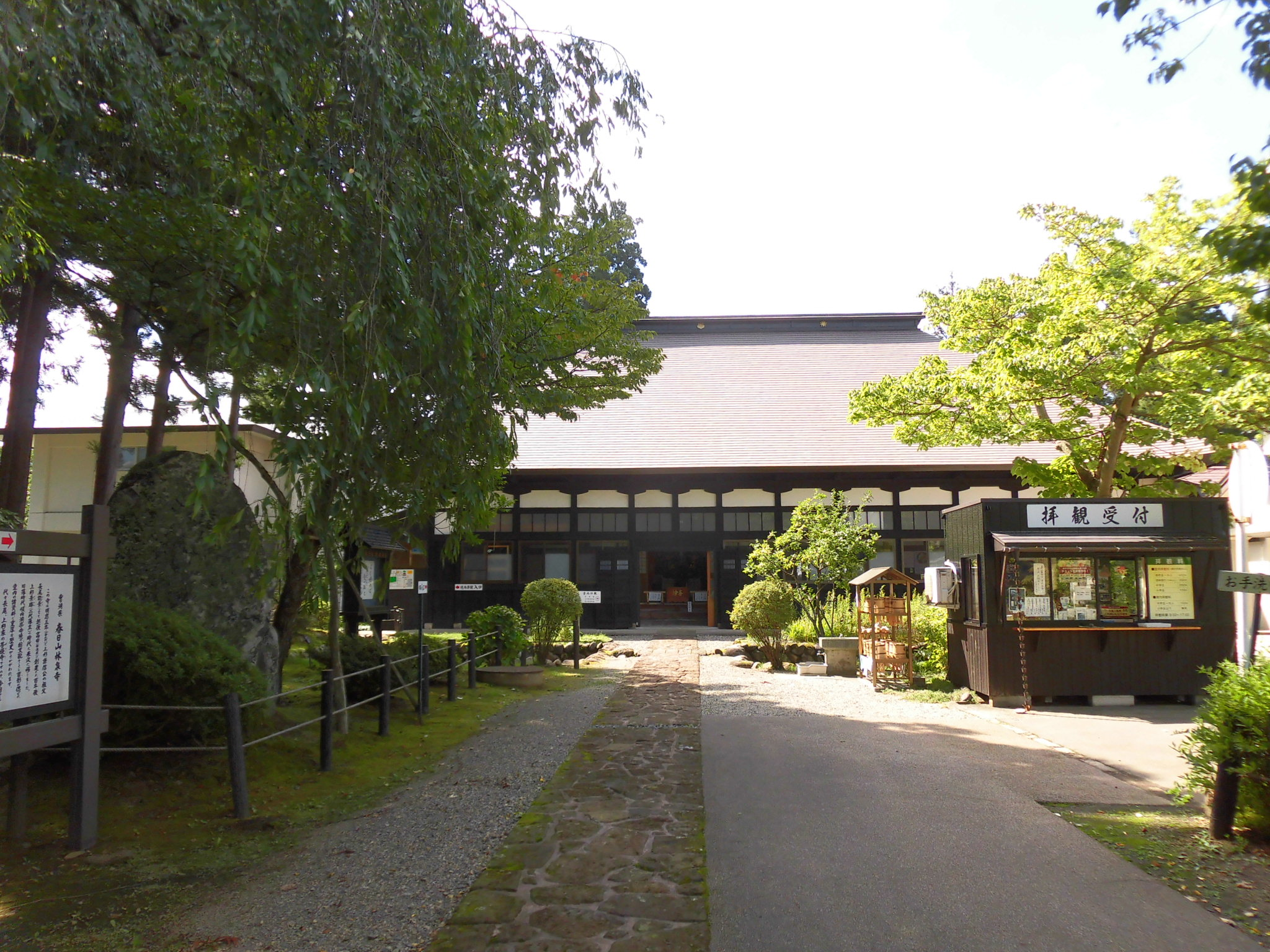 林泉寺。山形県米沢市に所在。 米沢藩上杉氏の菩提寺。